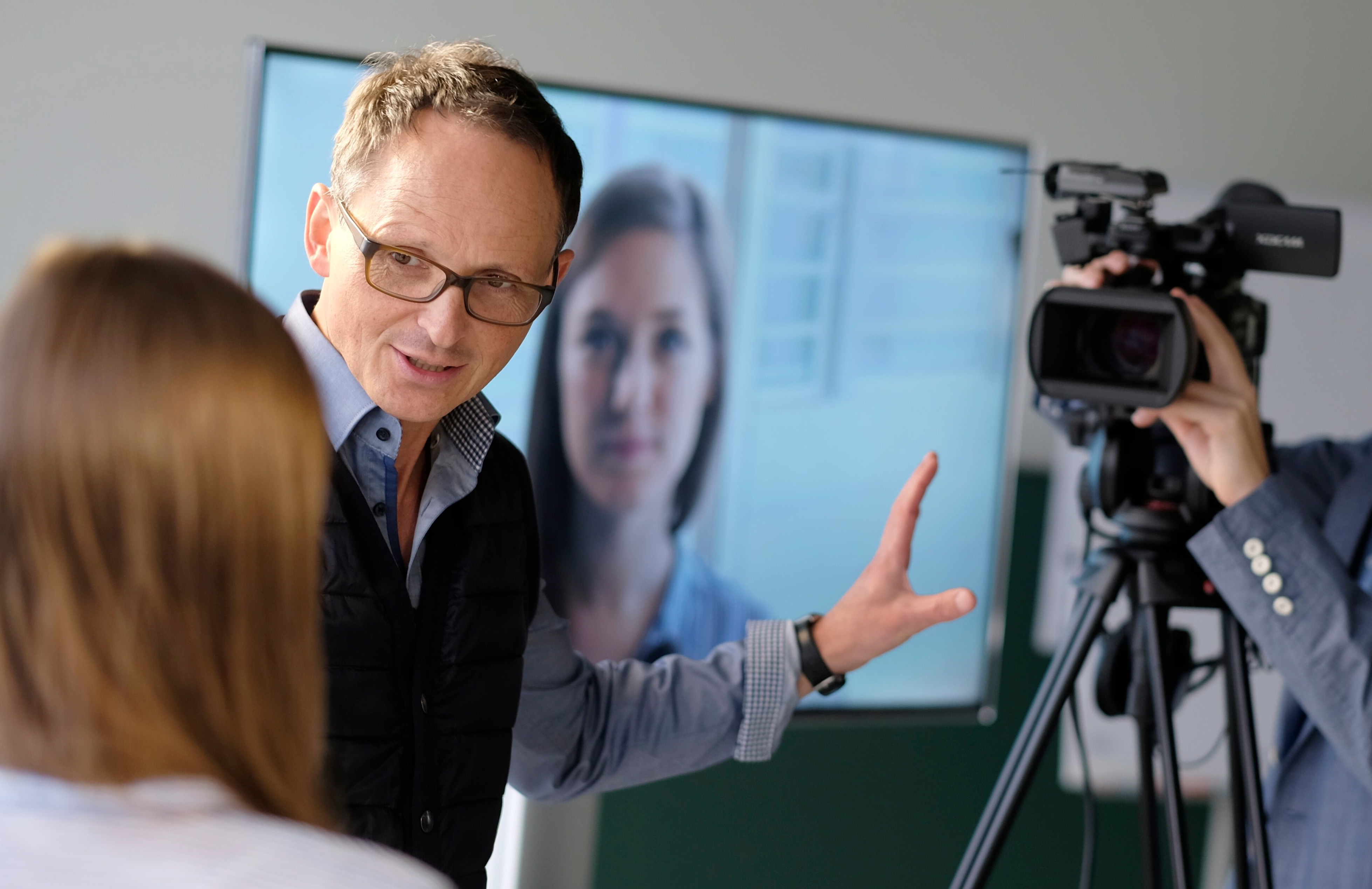 Axel Wagner während eines Interview-Seminars.